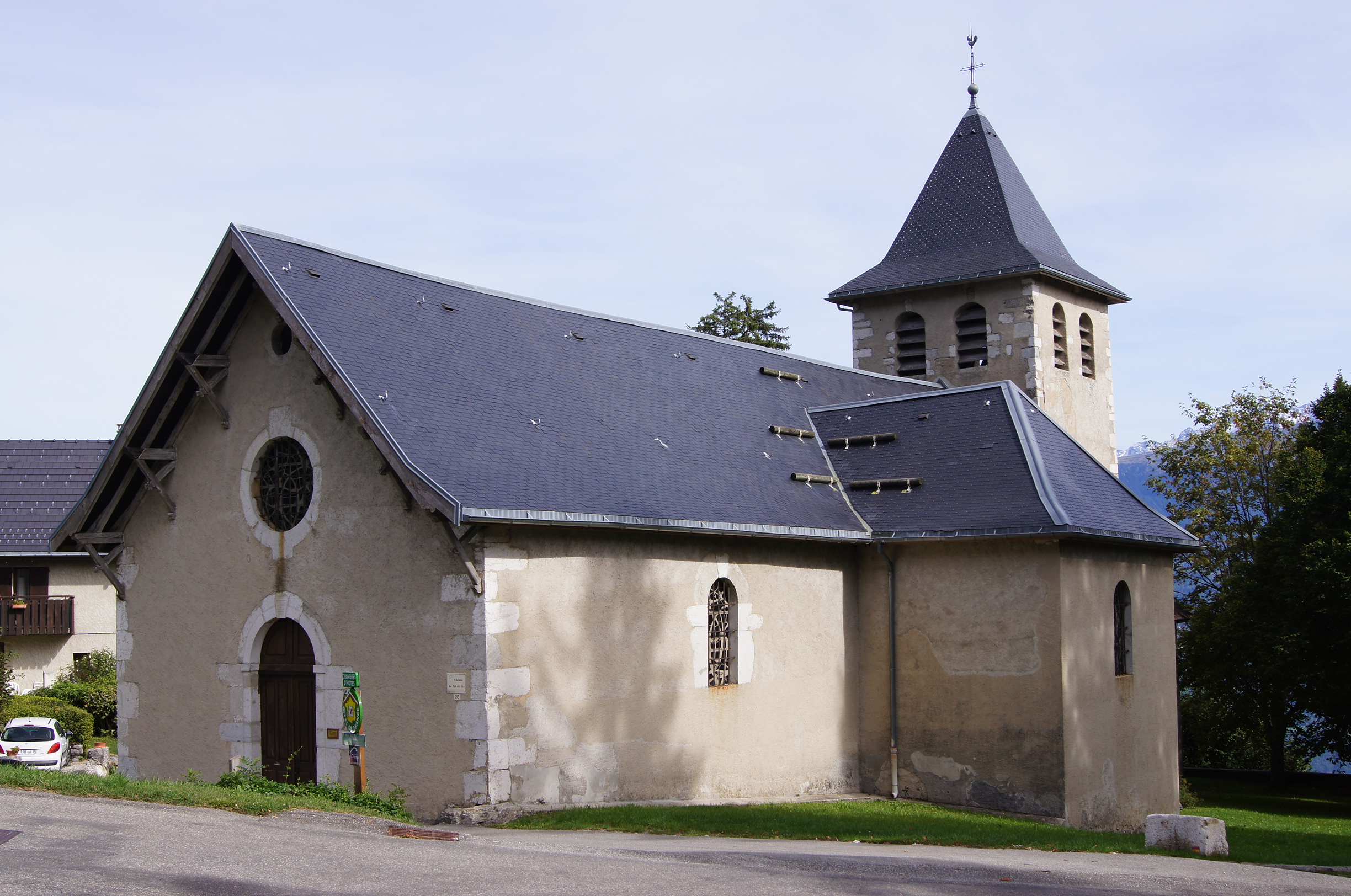 Eglise ST HILAIRE